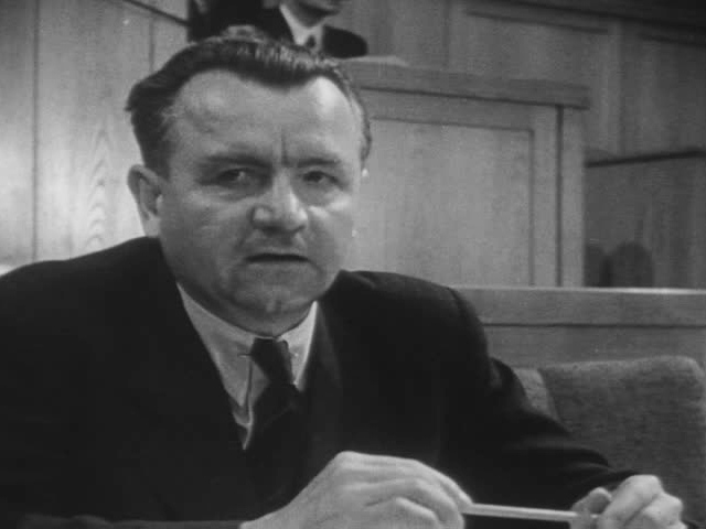 Klement Gottwald, záběr z amerického filmového týdeníku "The March of Time".